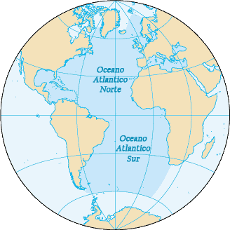 Norte y Sur del Océano Atlántico